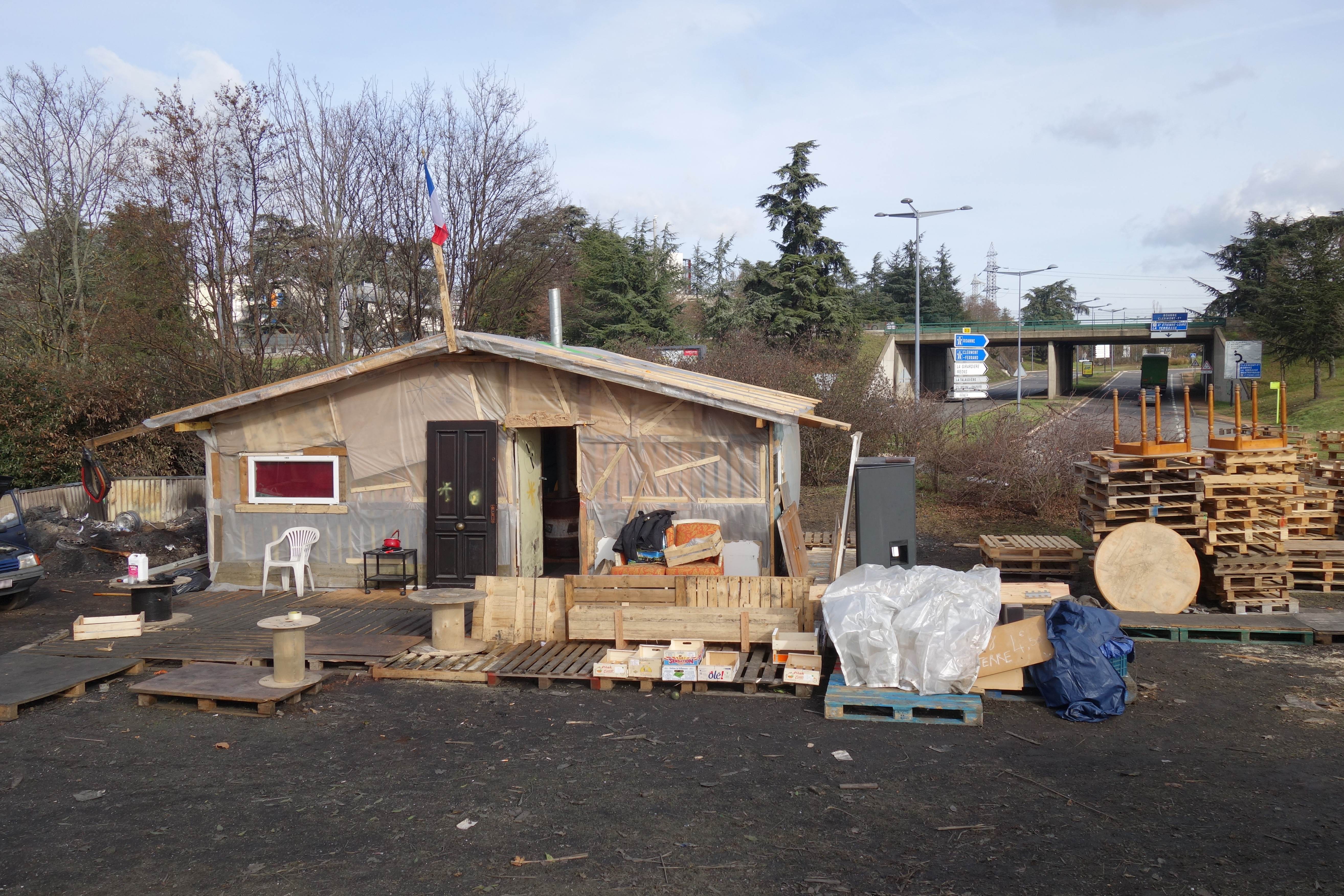 Cabane construite pour occuper le rond-point dans le cadre du mouvement des Gilets jaunes. Rond-point Necker.